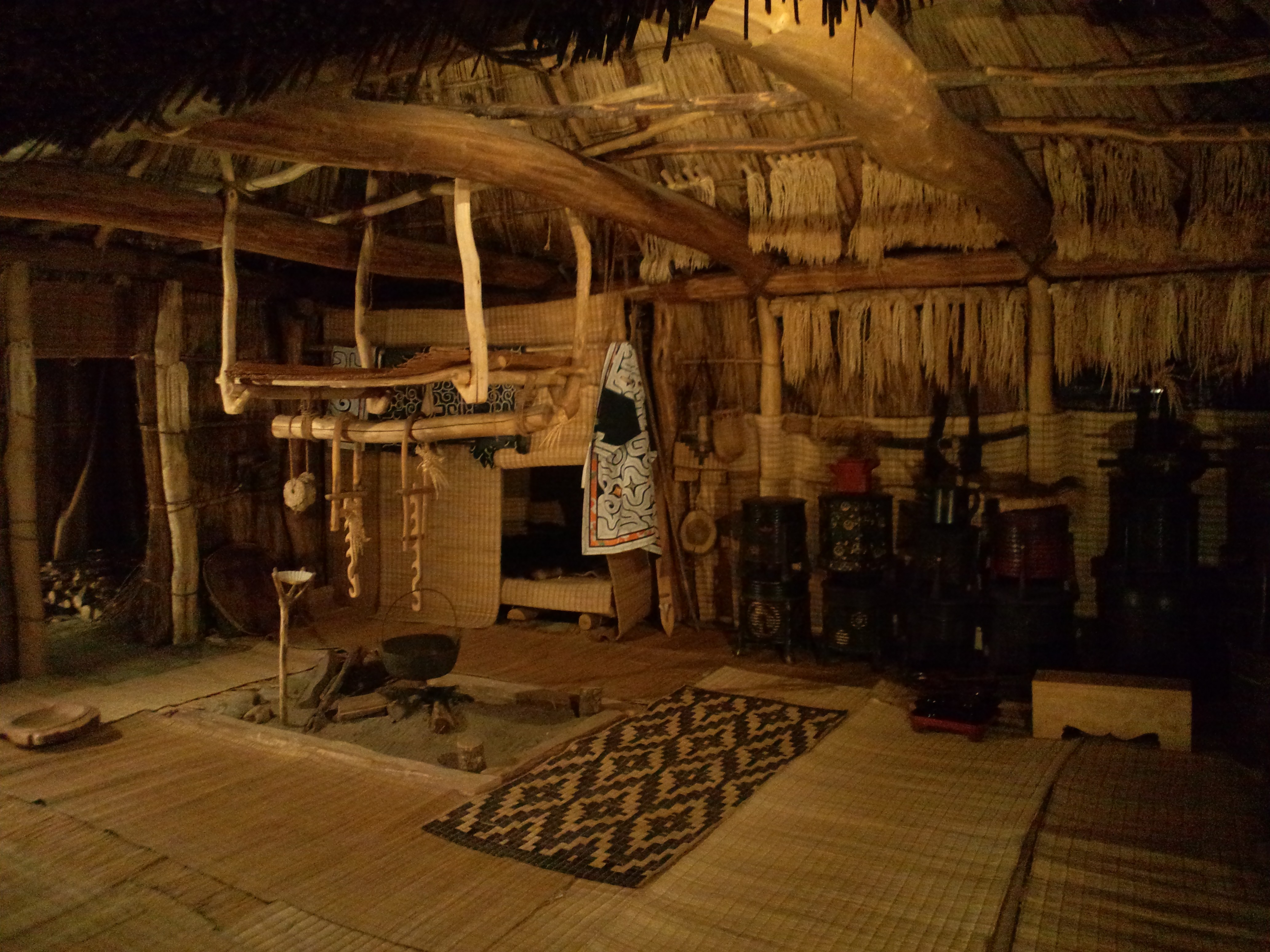 国立民族学博物館（大阪） アイヌの家・内部（北海道、沙流川流域）